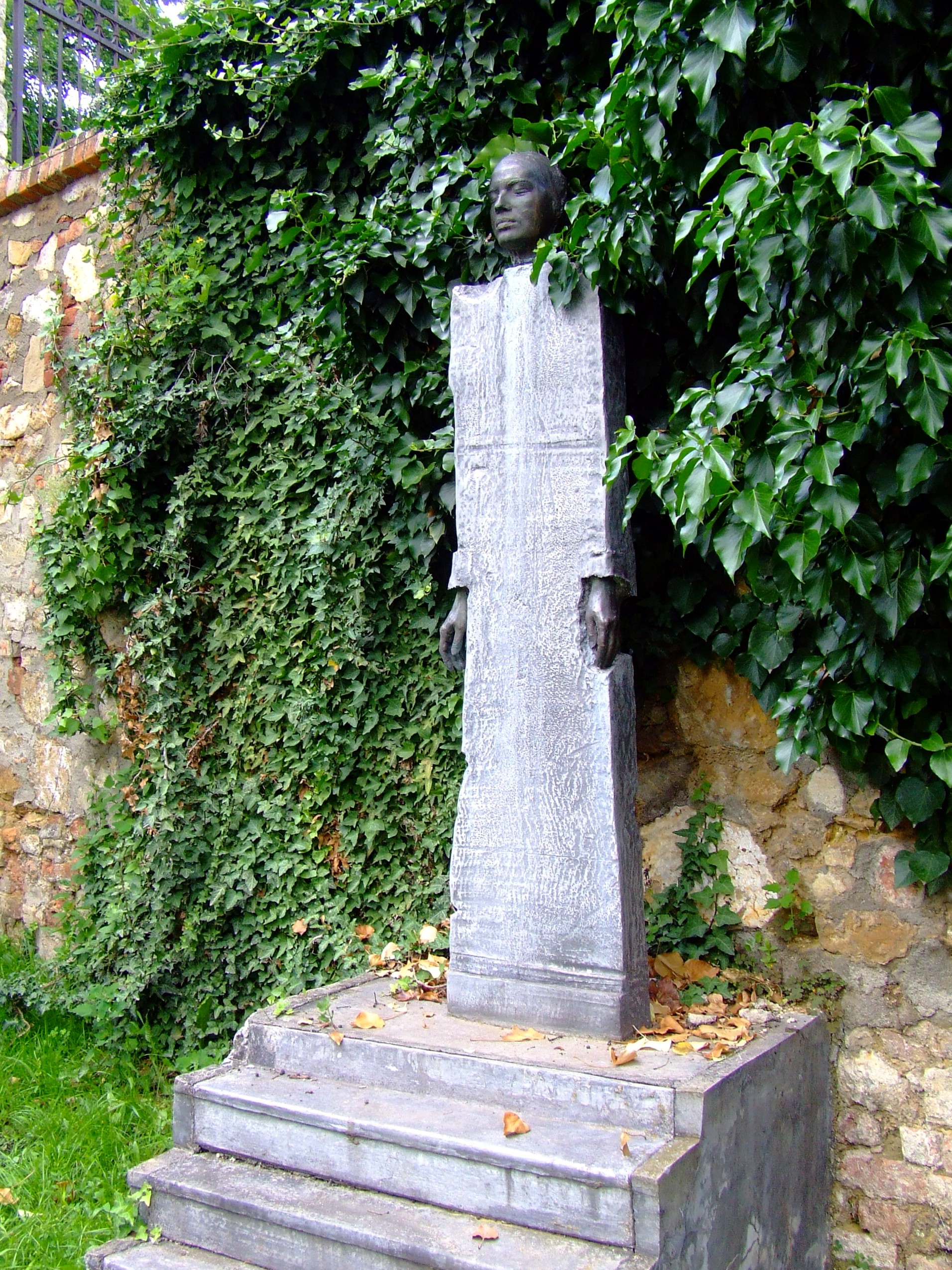 Schaár Erzsébet Önarckép című szobra Pécsen